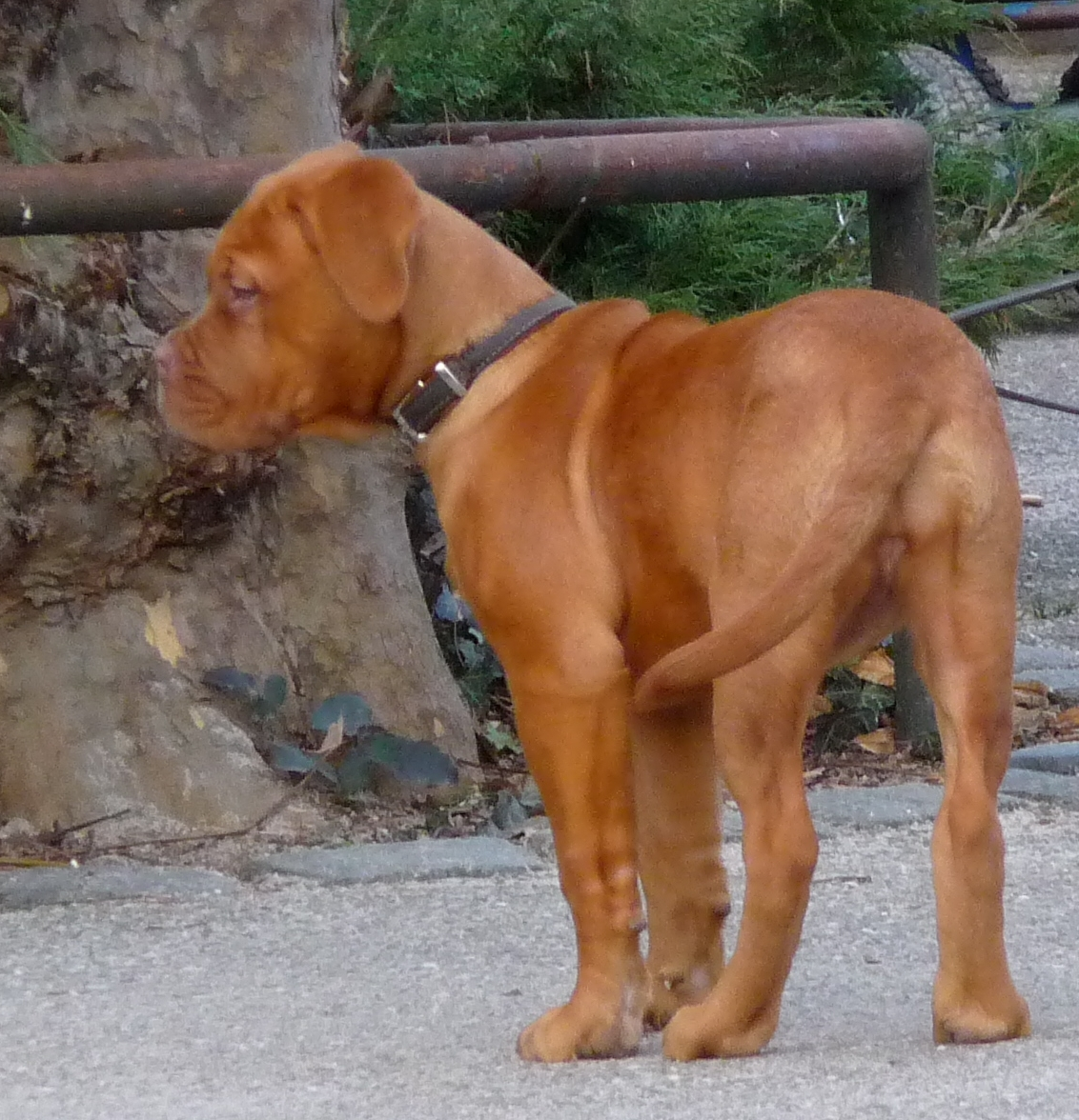 Bordeauxdoggen-Welpe (Dogue de Bordeaux)